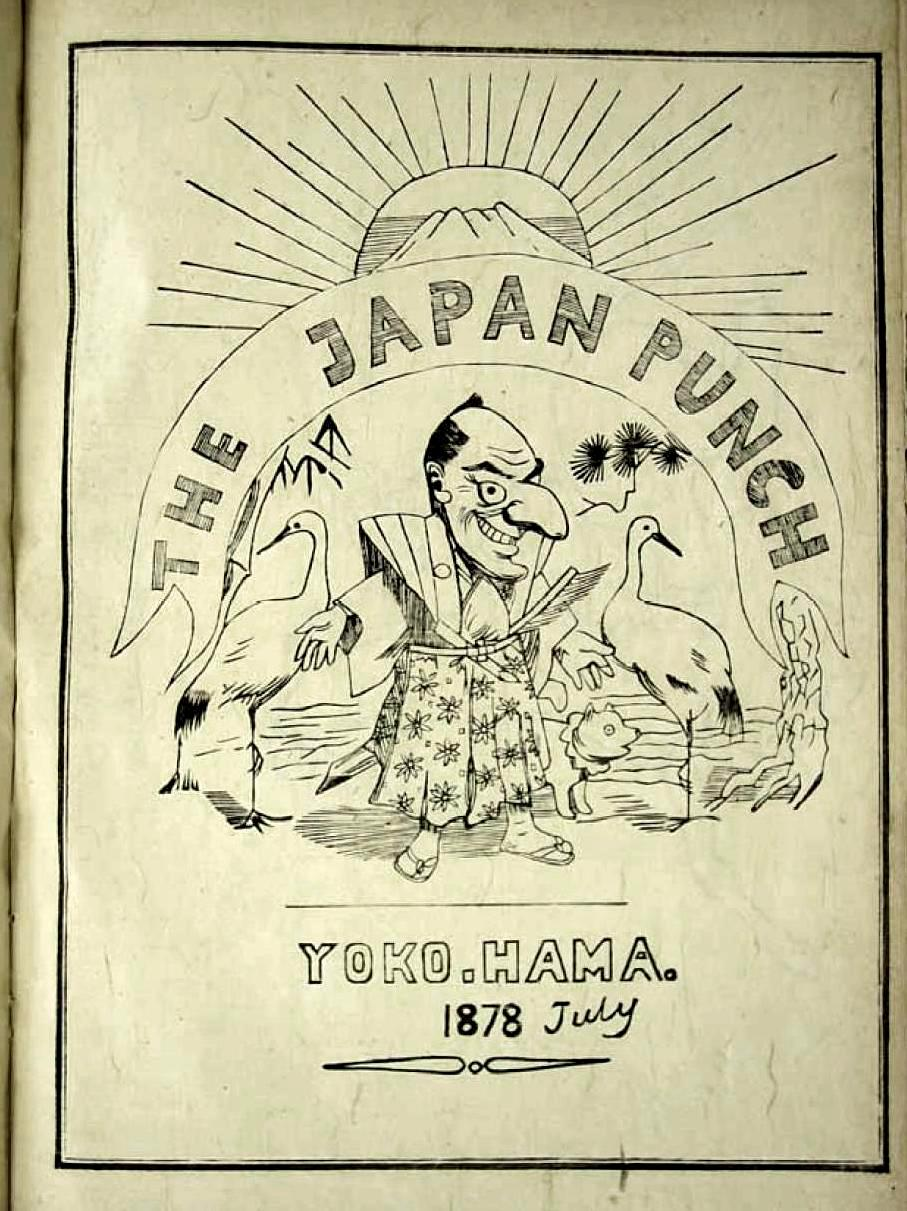 ジャパン・パンチ（Japan Punch） 1878年7月号